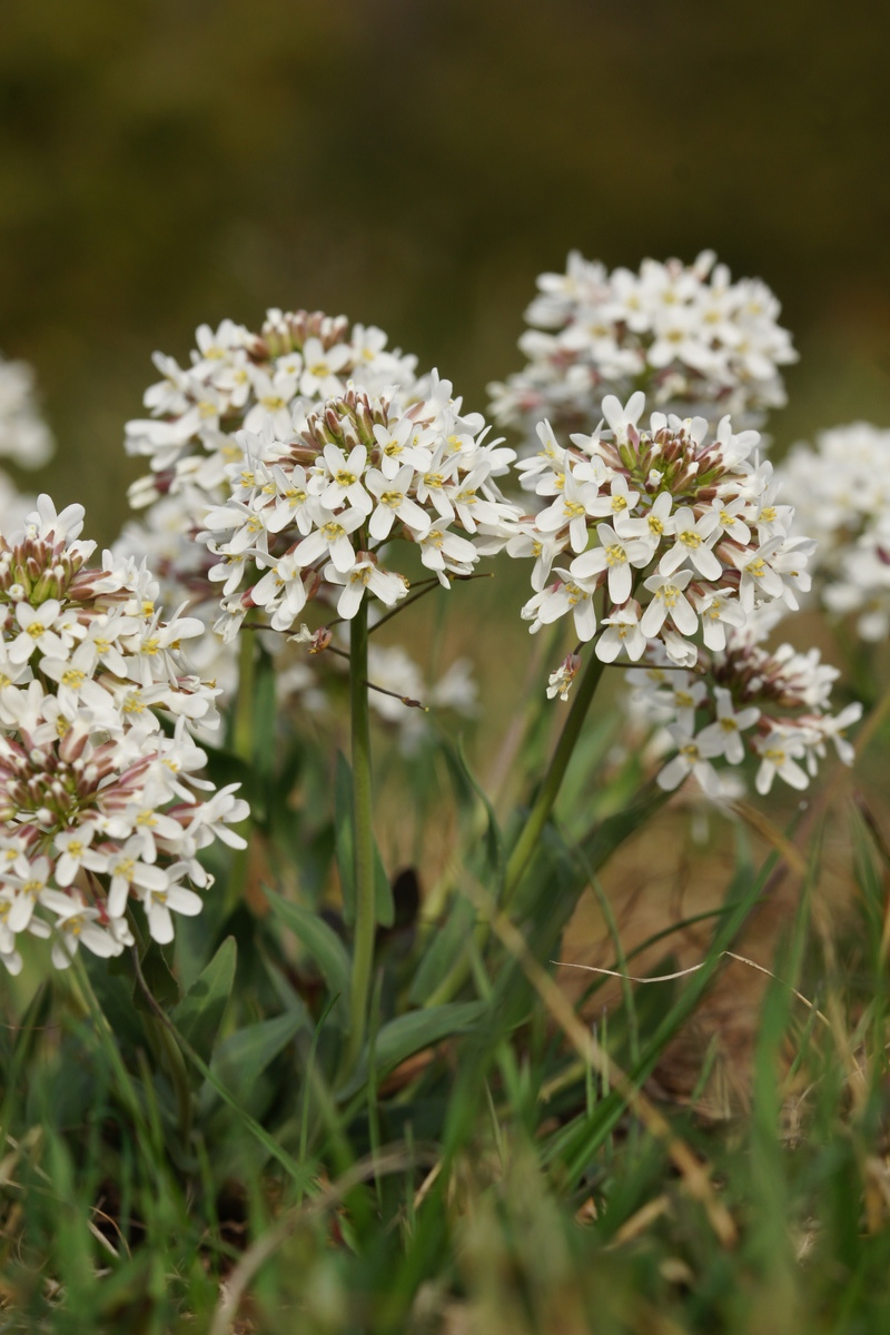 Prerasli mošnjak na vznožju Nanosa